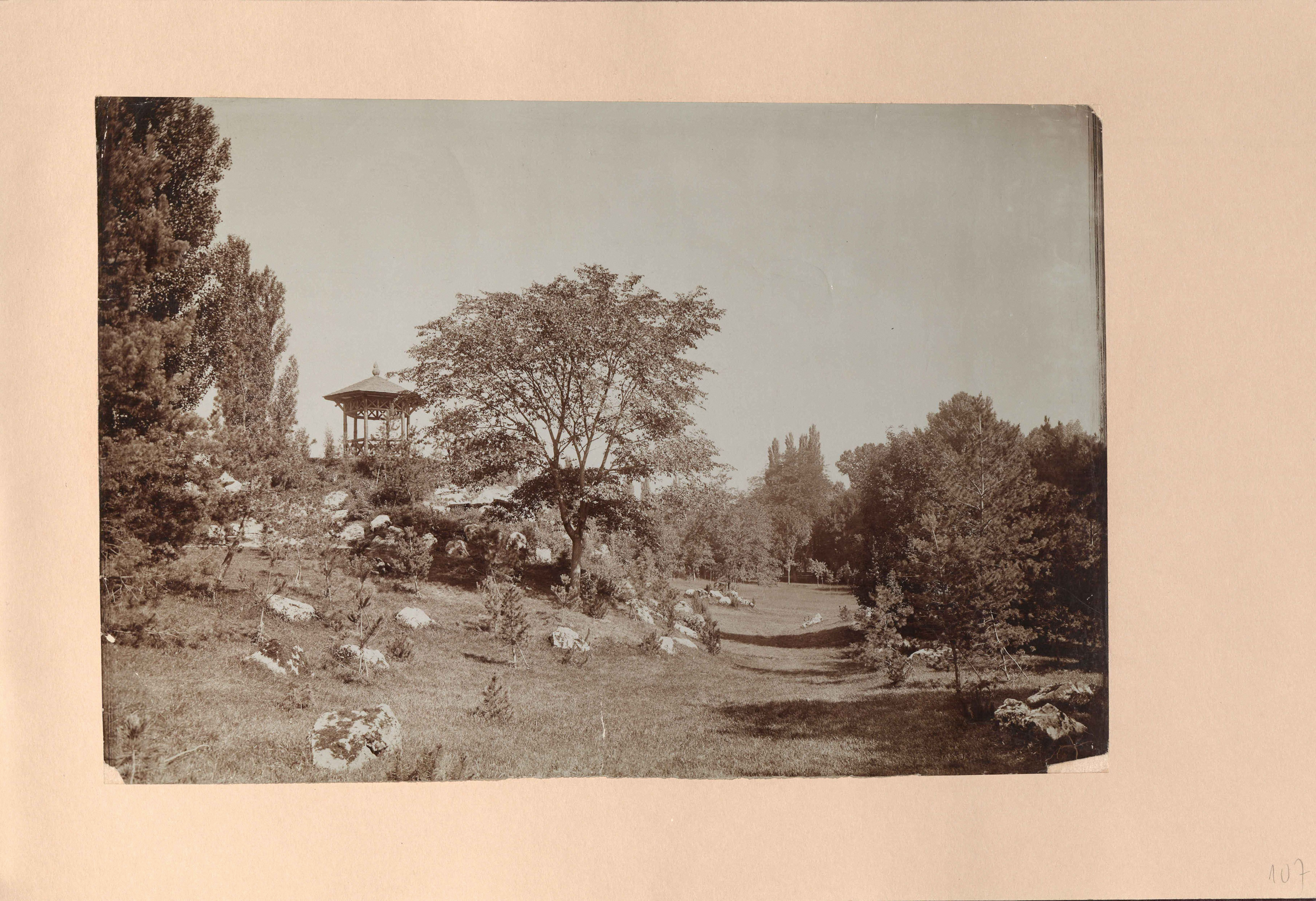 a Gerliczy-kastély parkja. A felvétel 1895-1899 között készült. A kép forrását kérjük így adja meg: Fortepan / Budapest Főváros Levéltára. Levéltári jelzet: HU.BFL.XV.19.d.1.11.212 Location: Hungary, Deszk